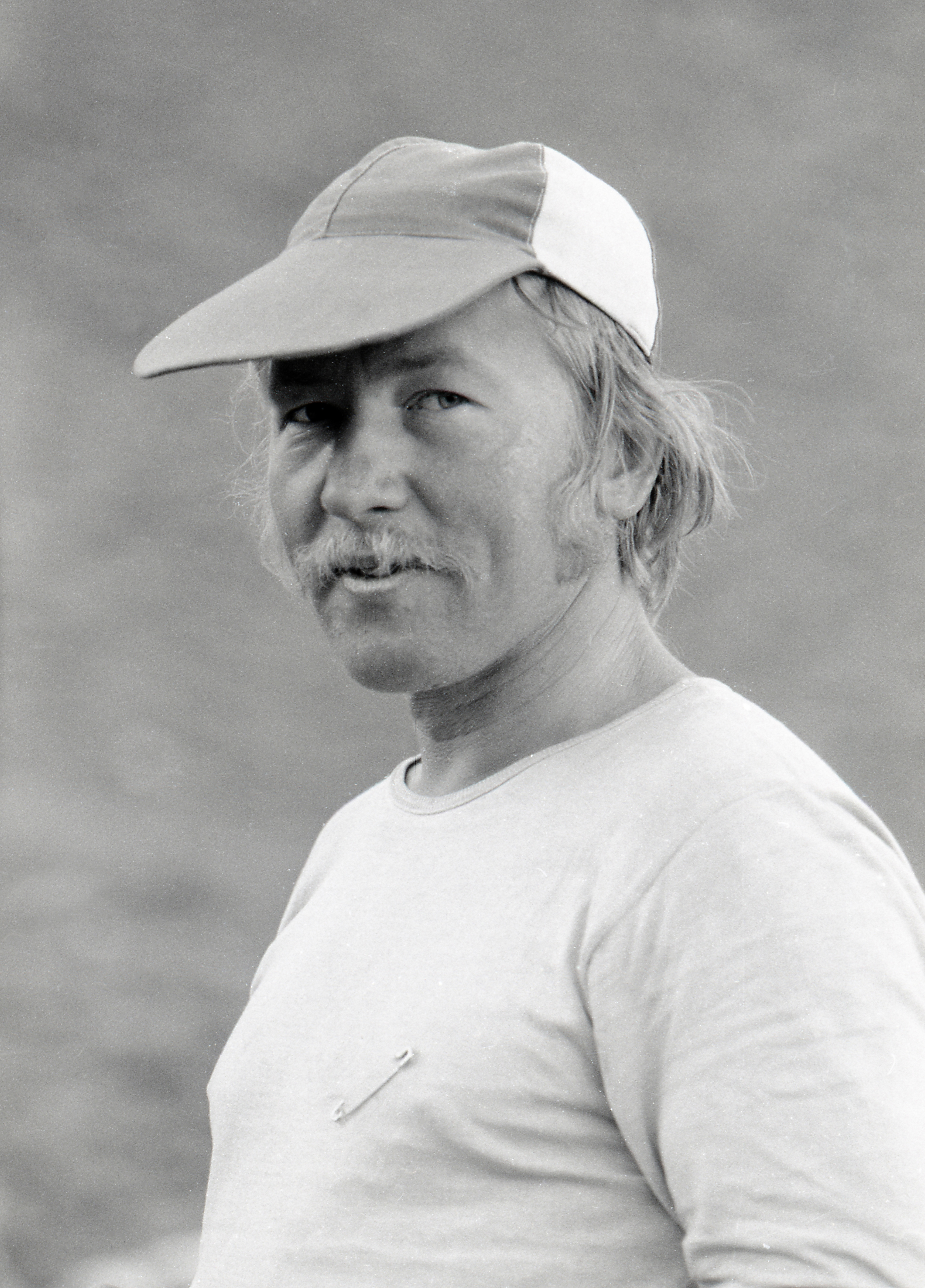 Kalev Muru